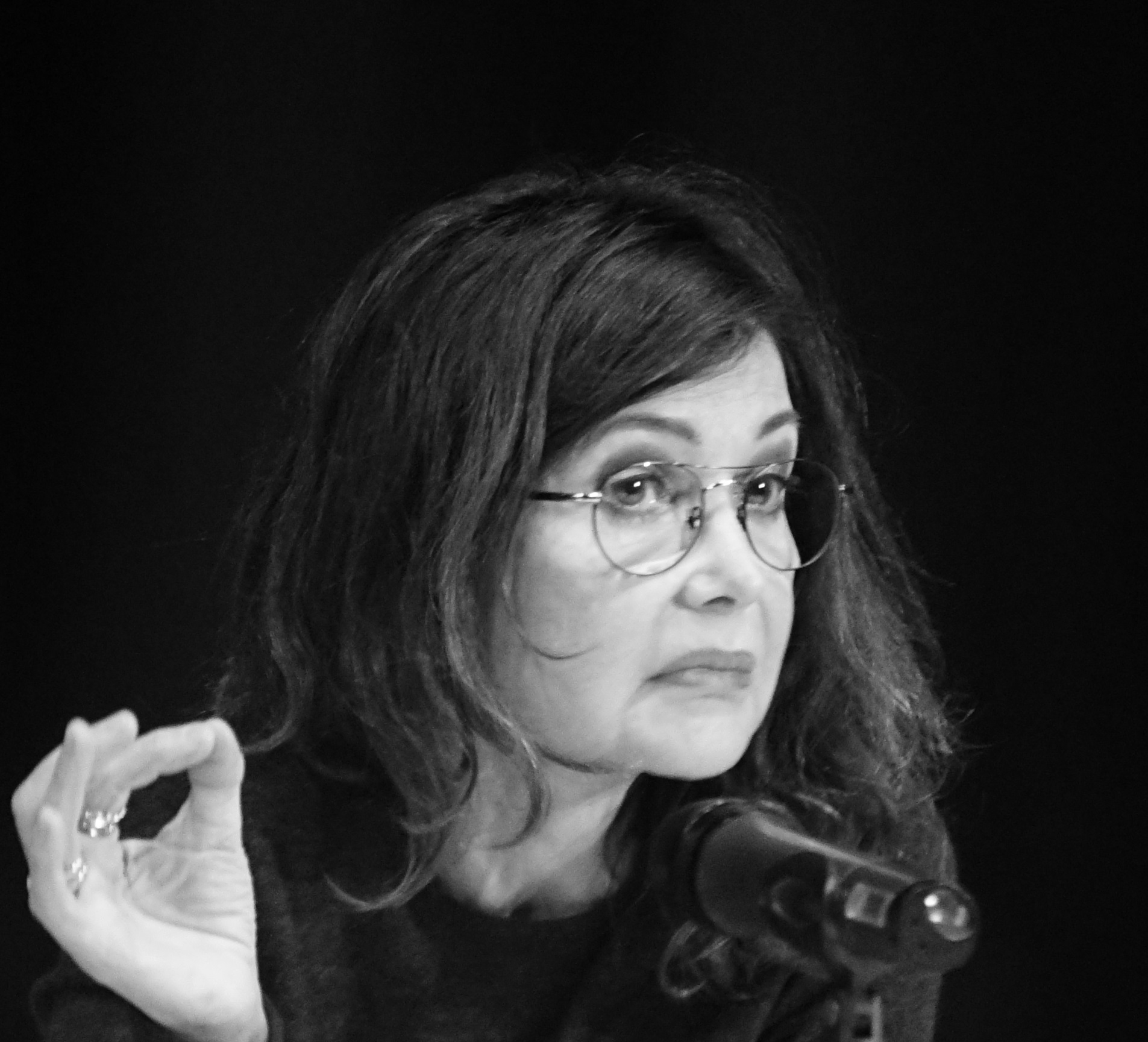 Lors de la Nuit de la lecture à Reims.